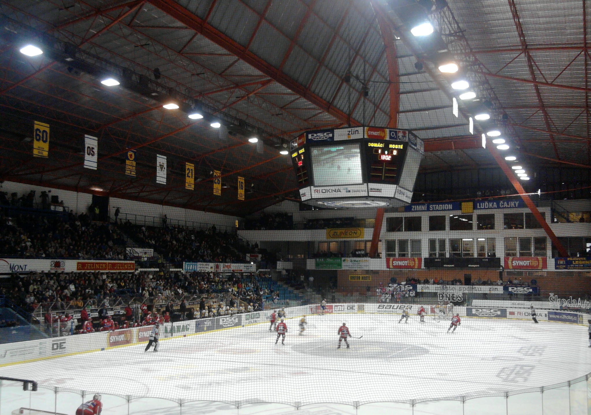 Zimní stadion Luďka Čajky ve Zlíně.